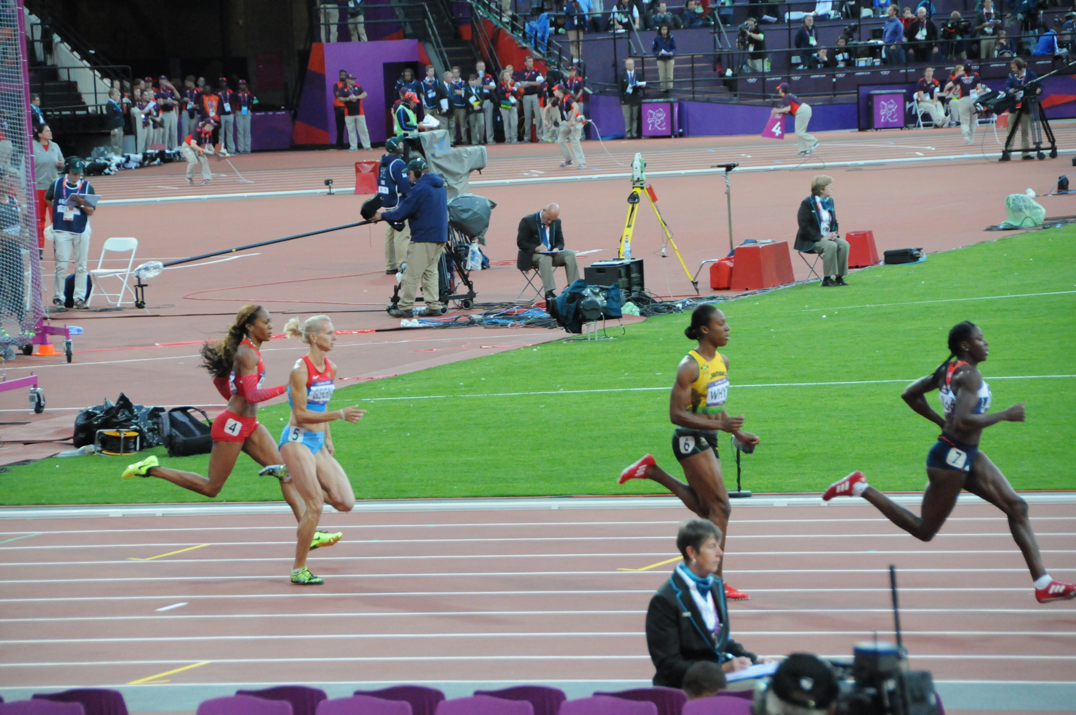 1er demi finale du 400m féminin des JO 2012 remportée par Sanya Richards-Ross devant la britanique Christine Ohuruogu.